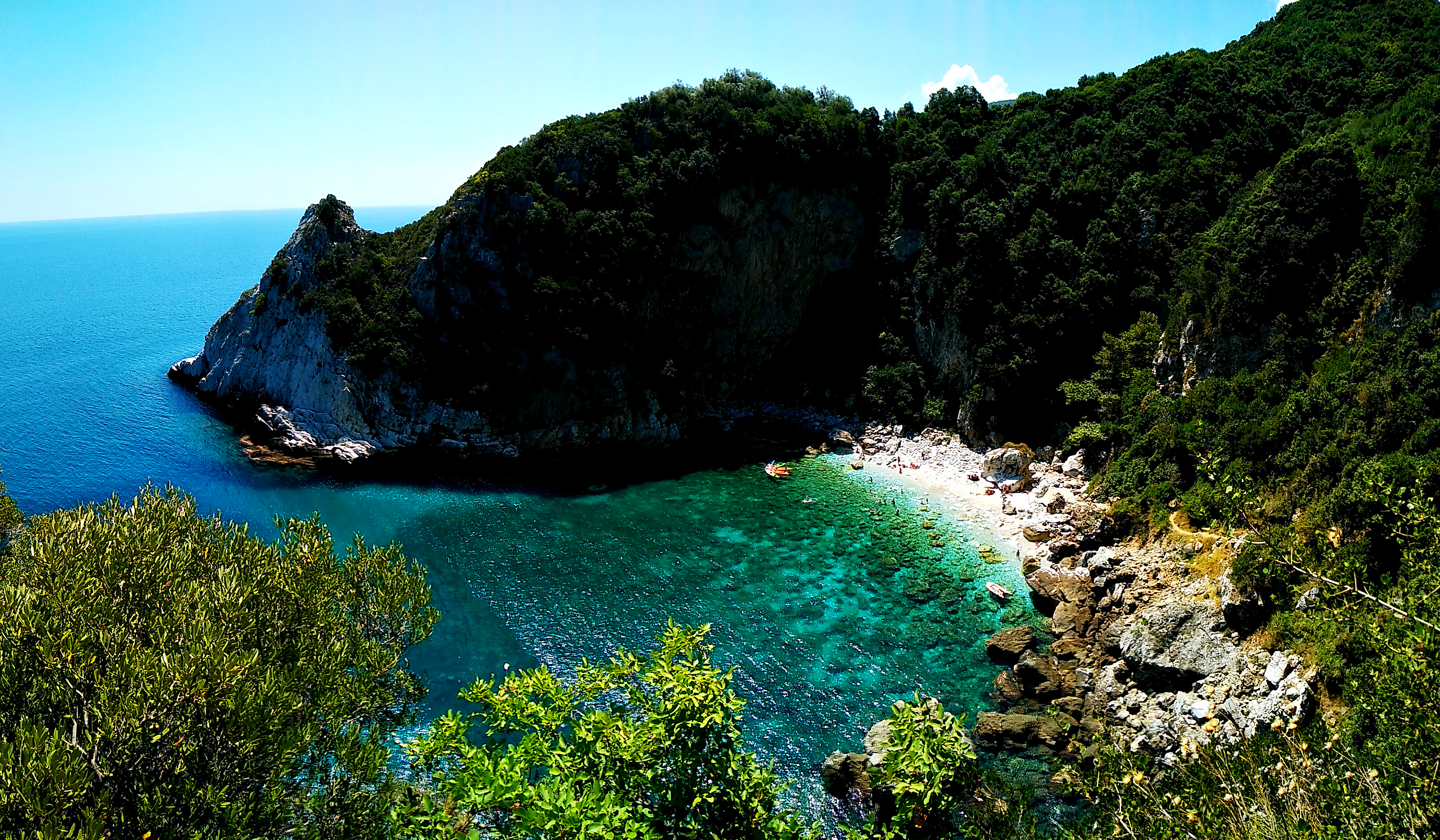 Η πανέμορφη και δυσπρόσιτη παραλία της Φακίστρας (Τσαγκαράδα, Β. Πήλιο) This is a photography of Natura 2000 protected area with ID GR1430001